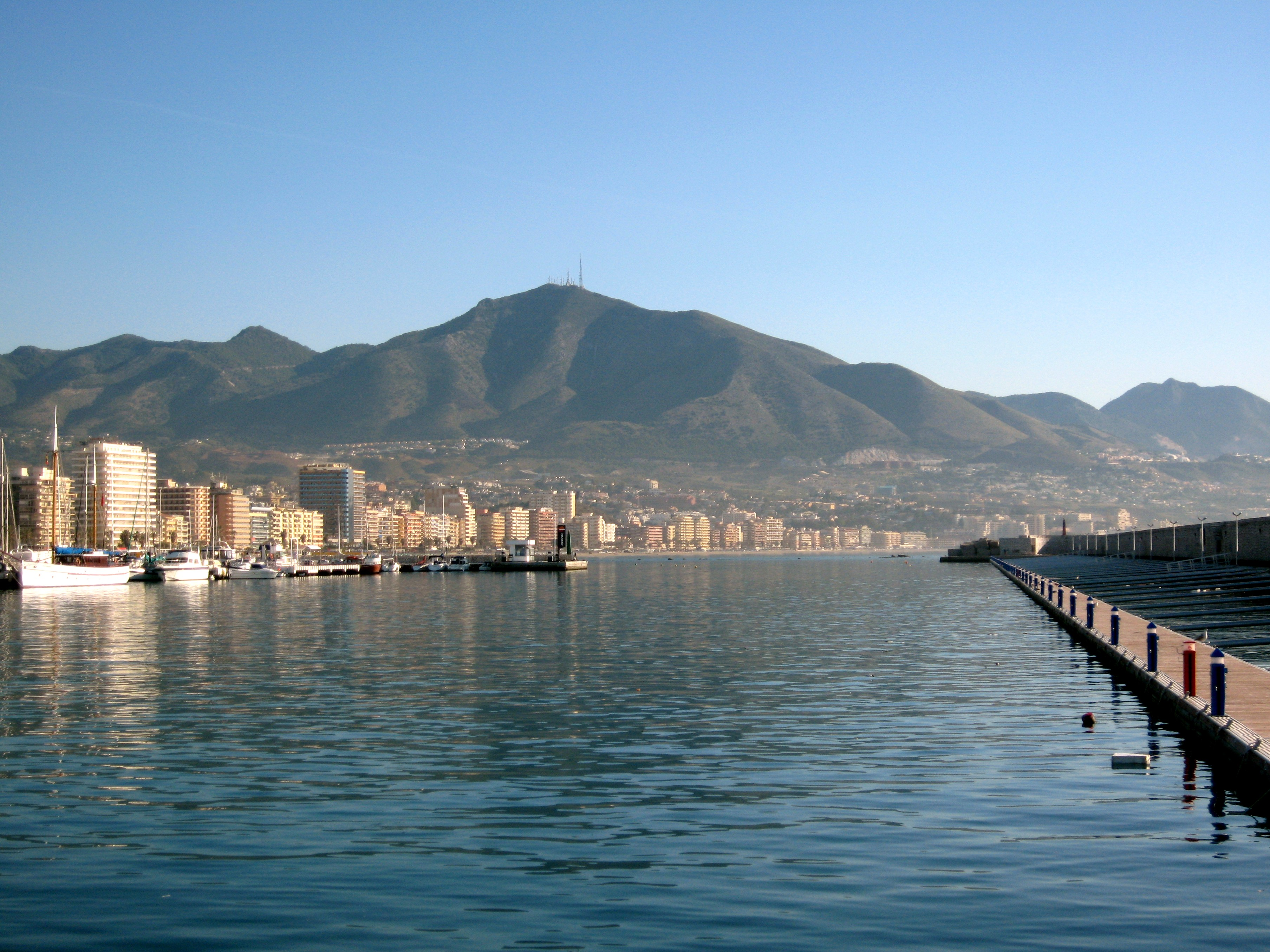 Hafen von Fuengirola, Provinz Málaga, Andalusien, Spanien